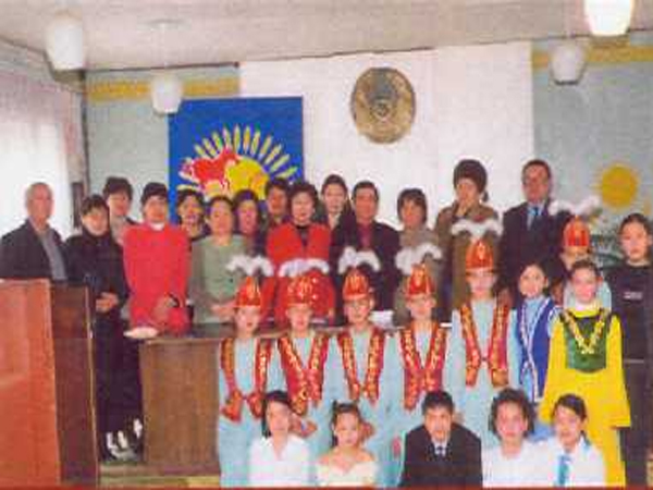 Шымкент орталықтандырылған кітапханалар жүйесі